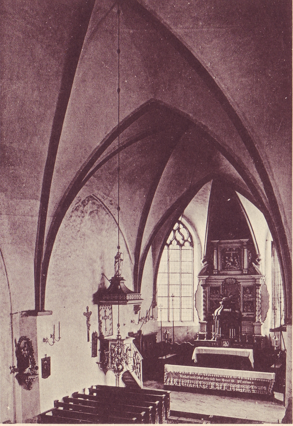 St. Ida (Herzfeld)